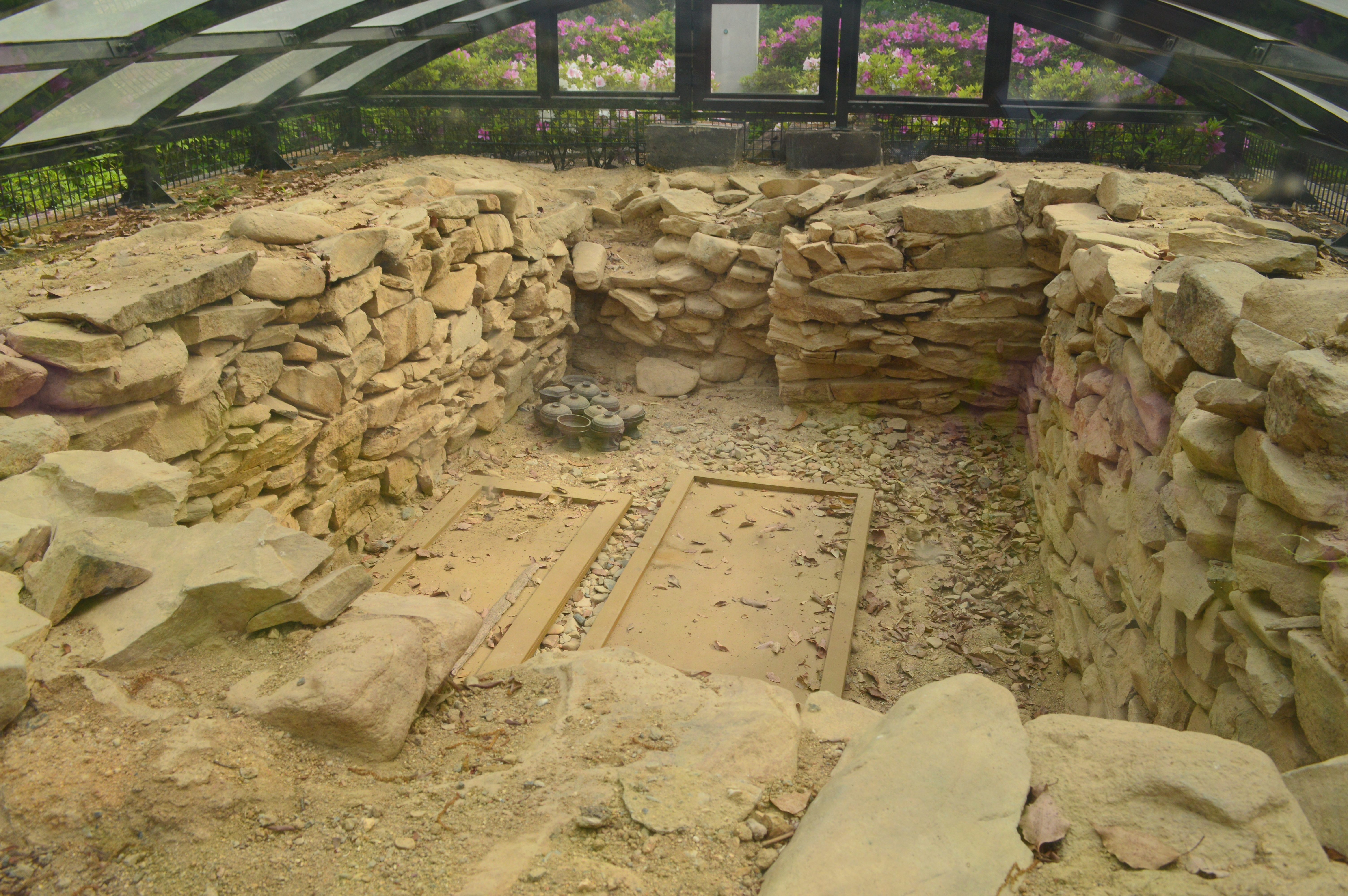 高井田山古墳 石室内部